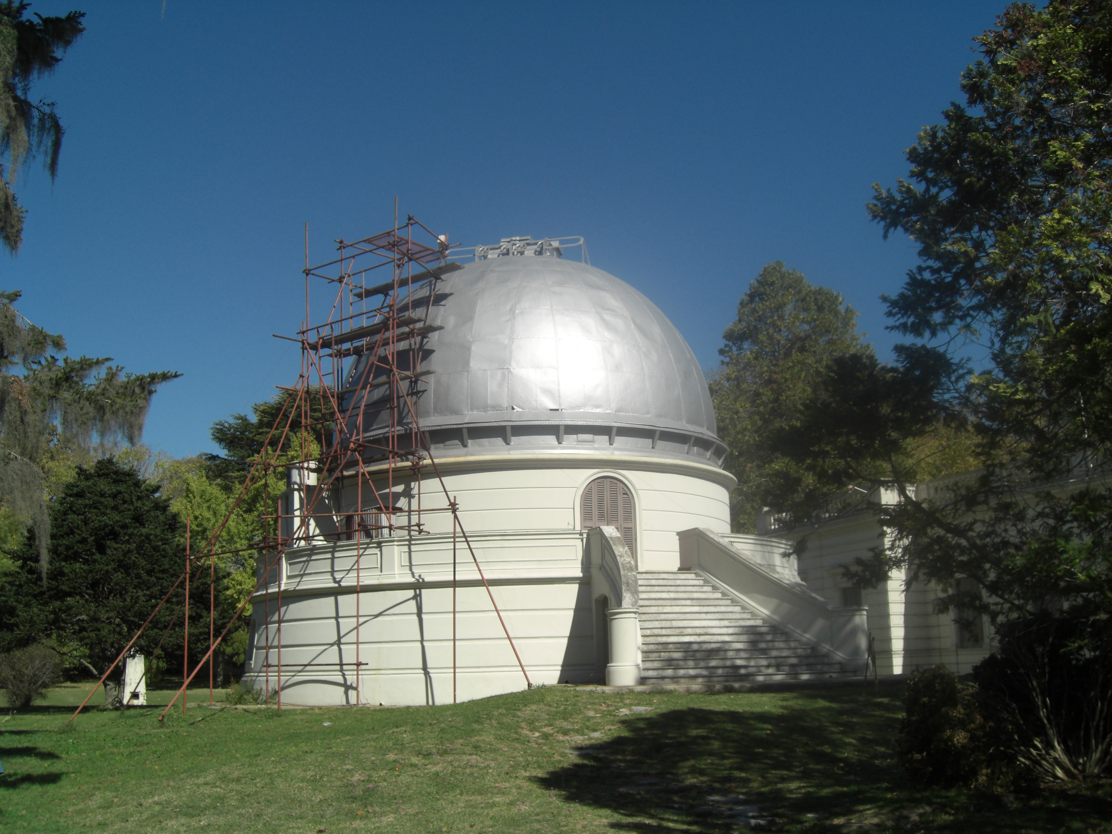 Edificio que alberga el telescopio Virpi Sinnika Niemela de la facultad de ciencias astrónomicas y geofísicas de La Plata, Argentina. el telescopio es uno de los varios que estan en el campus de la UNLP.